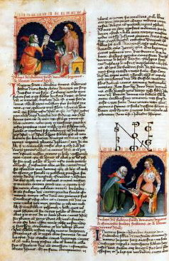 Codex Astensis . Miniatura dei Privilegi concessi da Federico II di Svevia ad Asti , Immagine tratta dal libro Asti medievale di A.Bianco ed CRA 1968 .